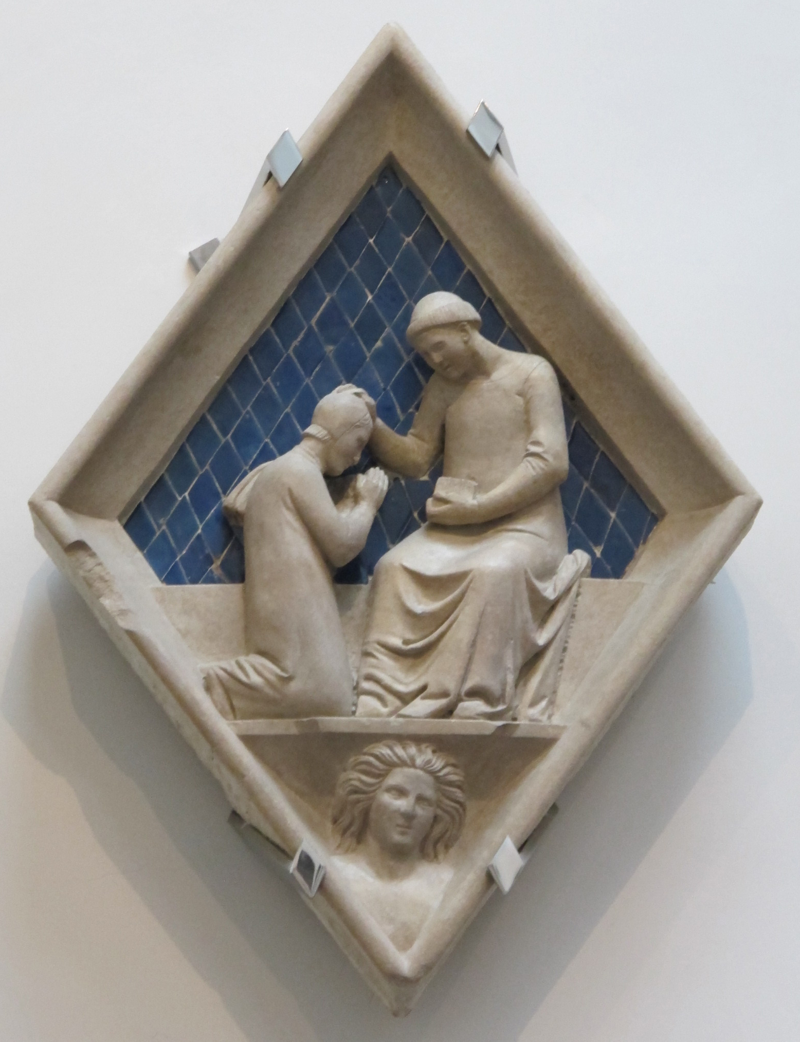 Maso di banco, penitenza, 1337-1341